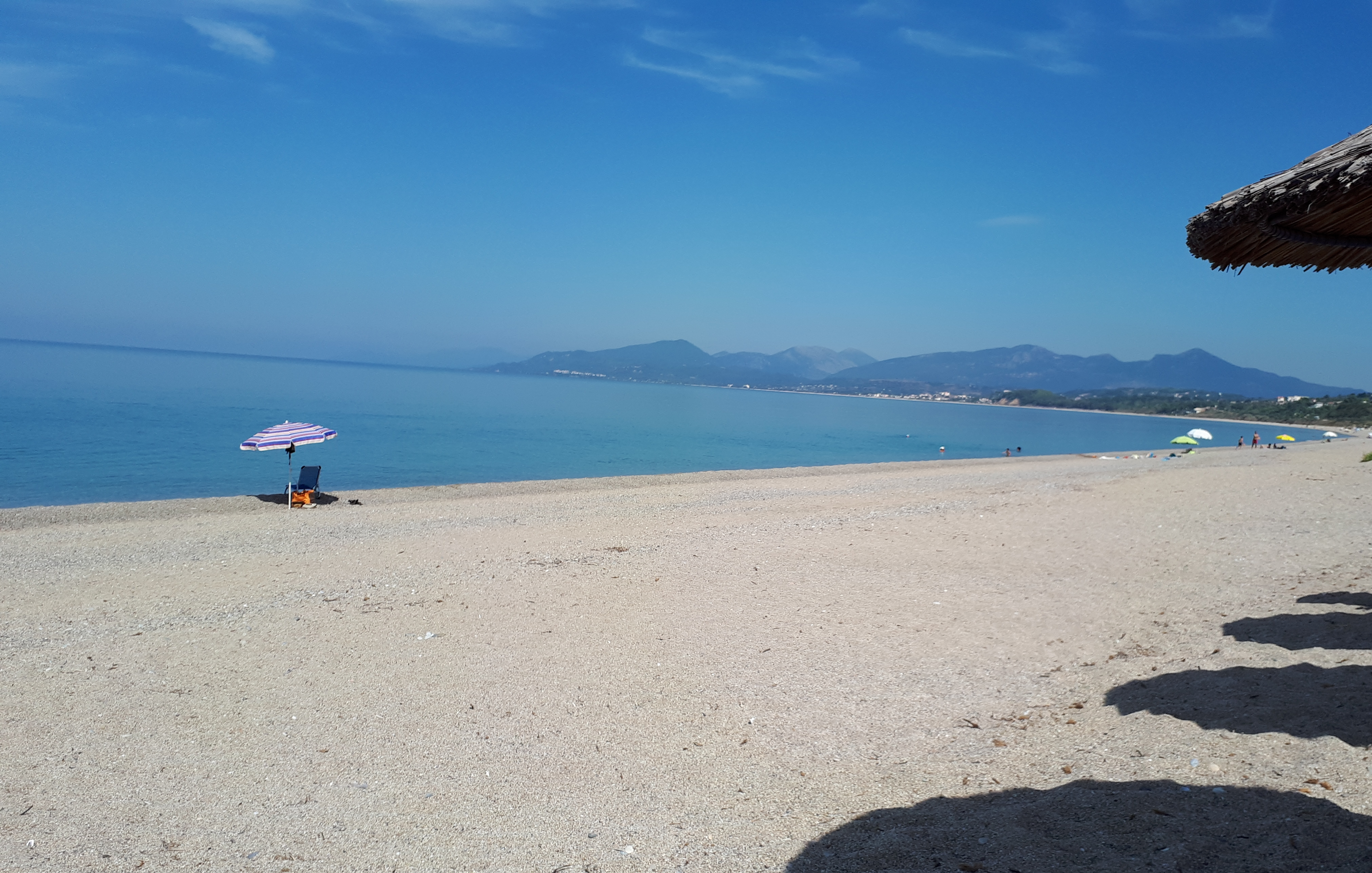 Η παραλία Μονολιθίου, μια από τις πιο μεγάλες σε μήκος αμμώδεις παραλίες, στο βάθος διακρίνεται το Ζάλογγο